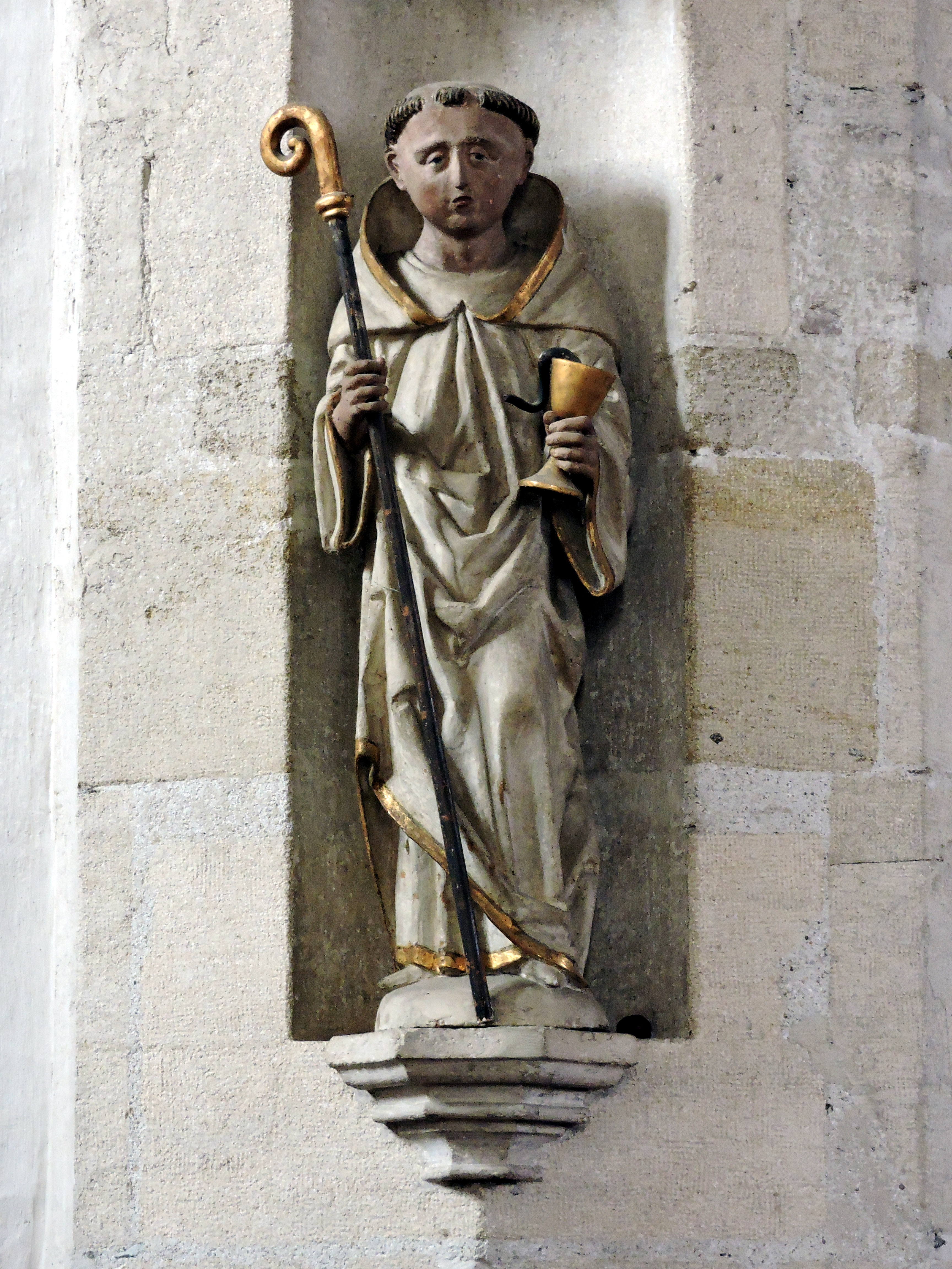 Kath. Pfarrkirche hl. Mauritius Figur des Hl. Benedikt unter der Orgelempore